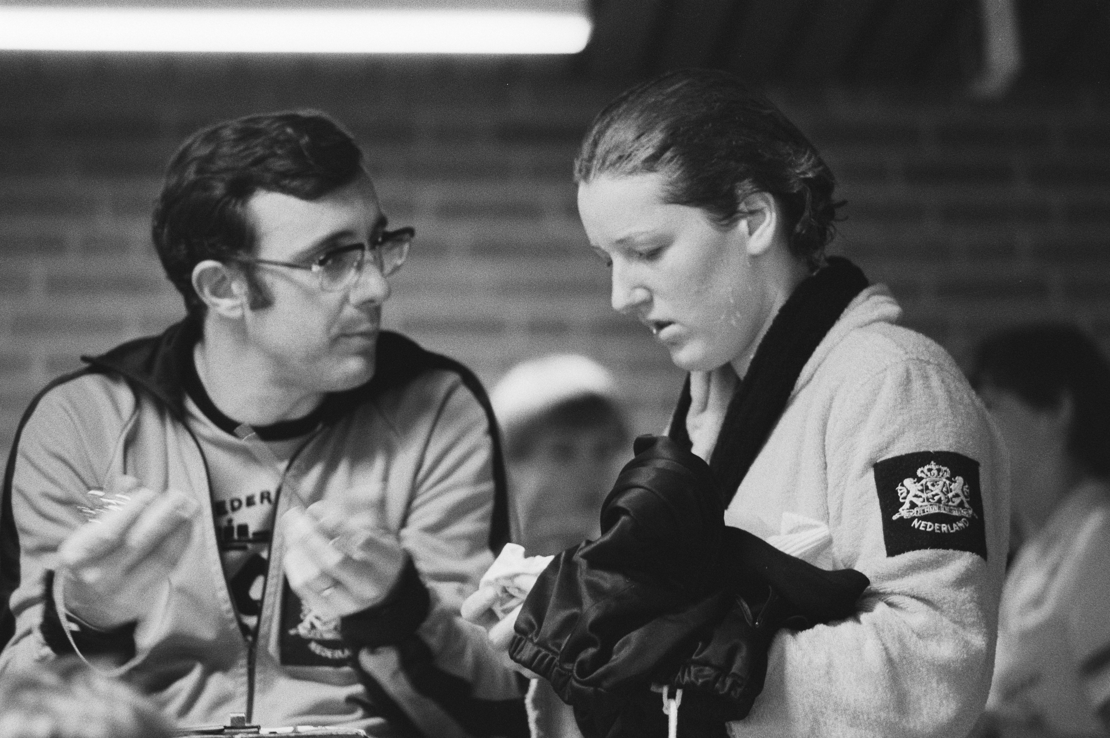 Collectie / Archief : Fotocollectie Anefo Reportage / Serie : Internationale zwemwedstrijden: Speedo-meet Amersfoort 1981 Beschrijving : Tracy Caulkins met haar coach Datum : 31 januari 1981 Locatie : Amersfoort, Utrecht (provincie) Trefwoorden : trainers, wedstrijden, zwembaden Persoonsnaam : Caulkins, Tracy Fotograaf : Antonisse, Marcel / Anefo, [onbekend] Auteursrechthebbende : Nationaal Archief Materiaalsoort : Negatief (zwart/wit) Nummer archiefinventaris : bekijk toegang 2.24.01.05 Bestanddeelnummer : 931-2960